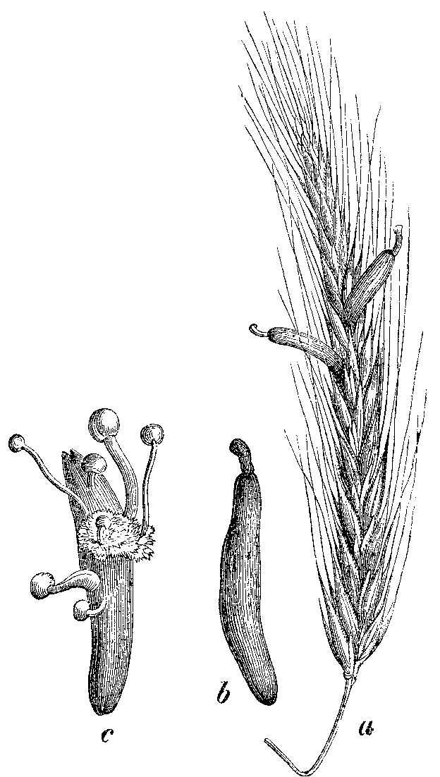 Slika 149. Ržéni rožíček. (Cláviceps purpúrea.)